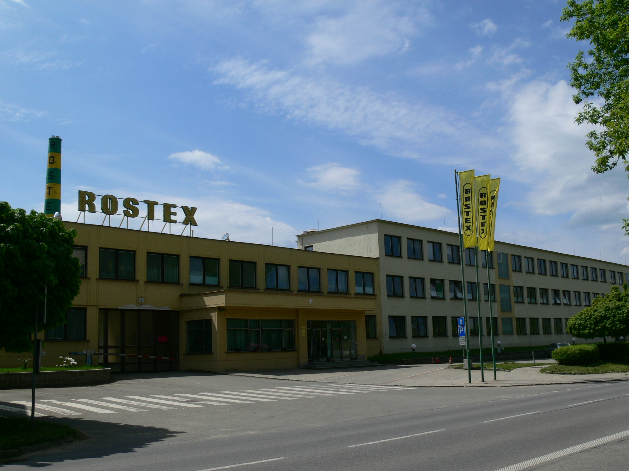 Dědice, Dědická, Rostex